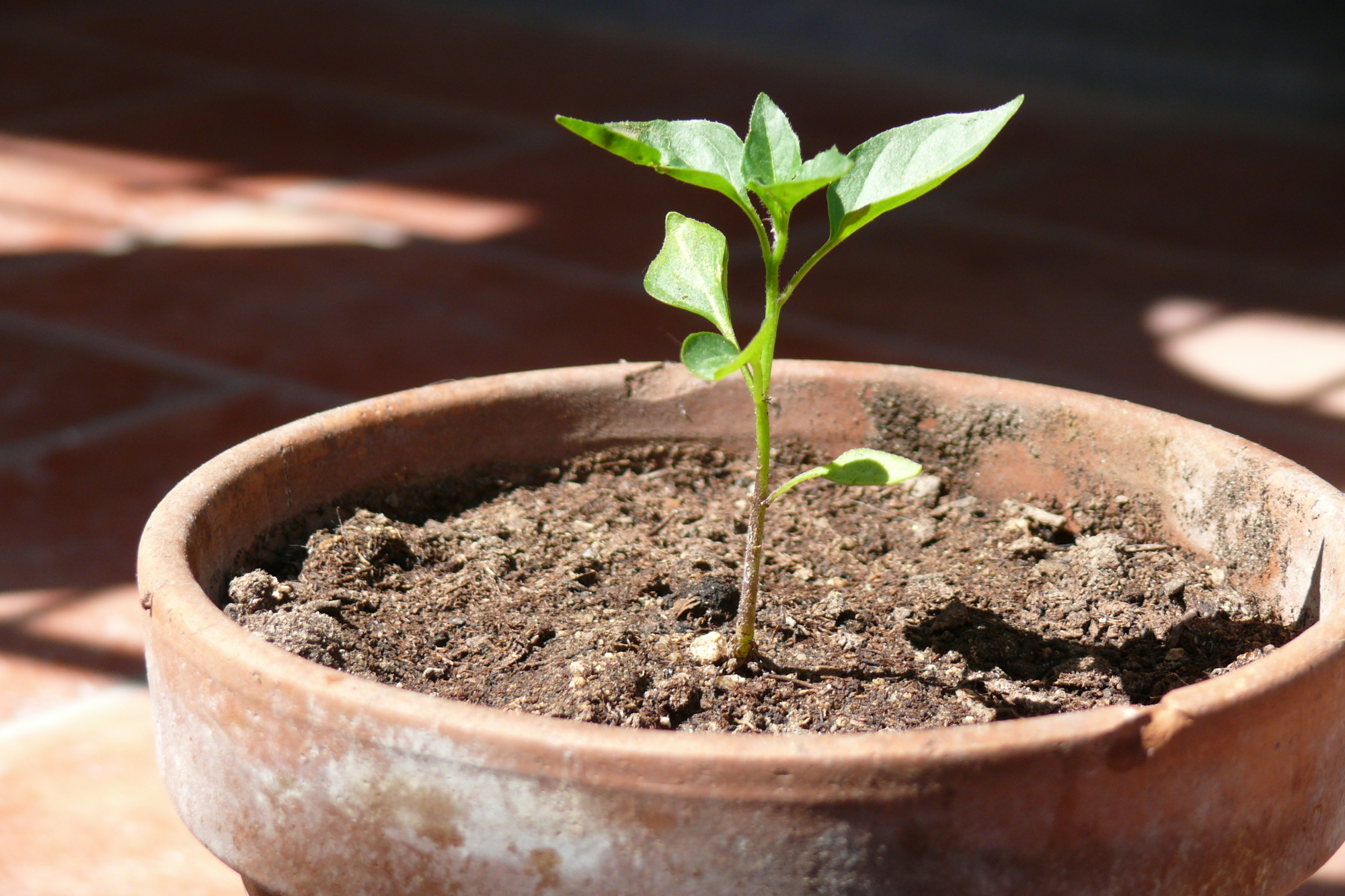 Una piantina di peperoncino coltivata in vaso